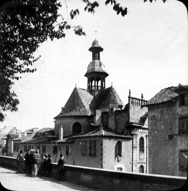 Fonds Trutat - Photographie ancienne Cote : TRU C 676 Localisation : Fonds ancien (S 30) Original non communicable Titre : Chapelle des Pénitents-Noirs, XVIIe siècle, Villefranche-de-Rouergue Auteur : Trutat, Eugène Rôle de l%u2019auteur : Photographe Lieu de création : Villefranche-de-Rouergue (Aveyron ; canton) Date de création : 1859-1910 [entre] Mesures : : 9 x 10 cm Mot(s)-clé(s) : -- Chapelle -- Pénitent -- Clocher -- Toit -- Vitrail -- Arbre -- Rue -- Mur -- Homme -- Villefranche-de-Rouergue (Aveyron ; canton) -- Midi-Pyrénées (France) -- Pyrénées (France) -- Chapelle des Pénitents-Noirs (Villefranche-de-Roue -- 19e siècle, 2e moitié -- 20e siècle, 1e quart -- 17e siècle Médium : Photographies -- Positifs sur plaque de verre -- Noir et blanc -- Vues d'architecture Voir : TRU C 670 Cour de la Chartreuse [Saint-Sauveur], TRU C 671 Porche de l'église de la Chartreuse (1558), TRU C 672 Grand cloître de la Chartreuse (1558), TRU C 673 Eglise de la Chartreuse, Villefranche-de-Rouergue TRU C 674 Petit cloître de la chartreuse (XVe siècle), TRU C 675 Porte du XVe siècle à l'hôpital, (ancienne Bibliothèque de Toulouse. Domaine public